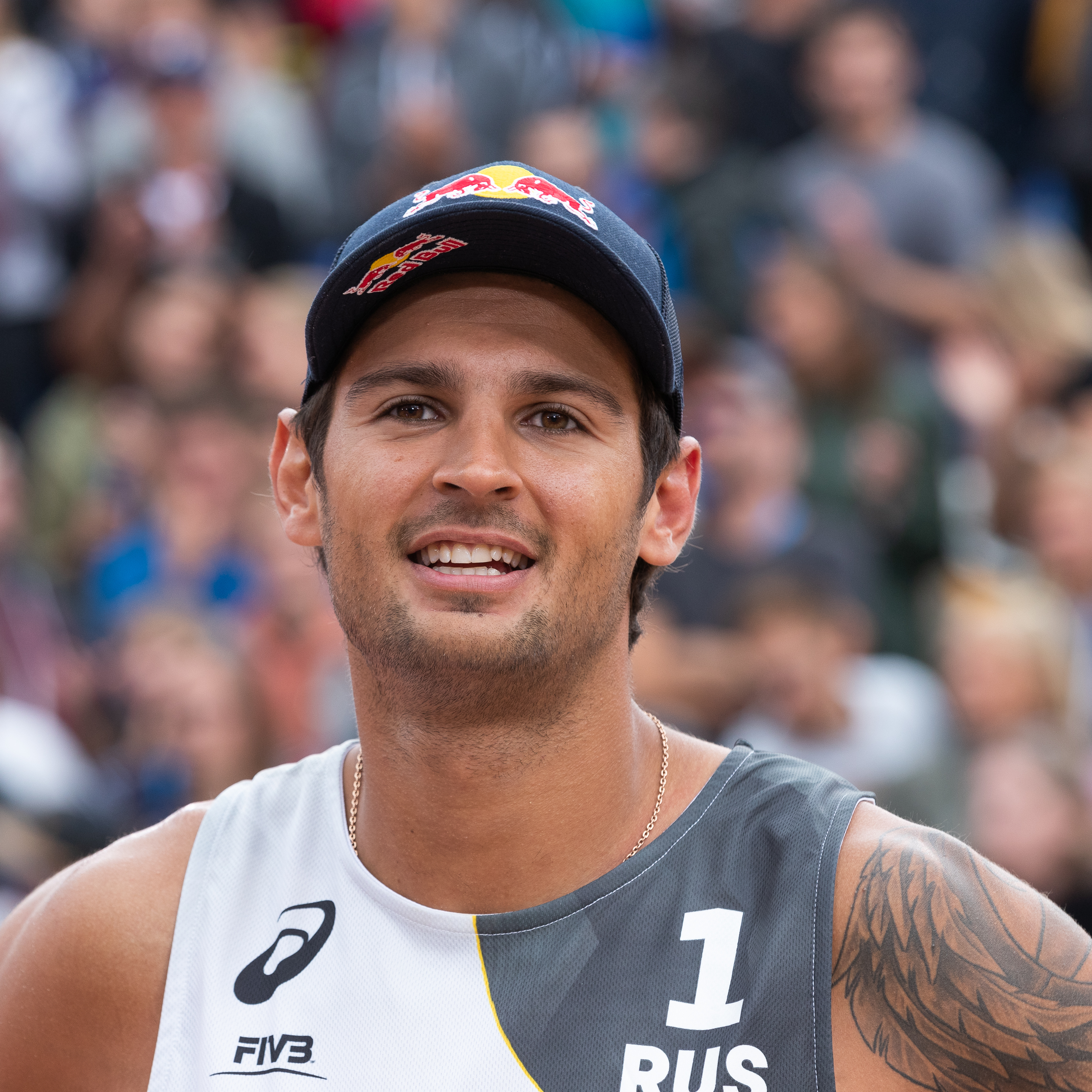 BeachVolleyball Weltmeisterschaft Hamburg 2019; Viacheslav Krasilnikov (RUS, Russland); Porträt, Einzelbild